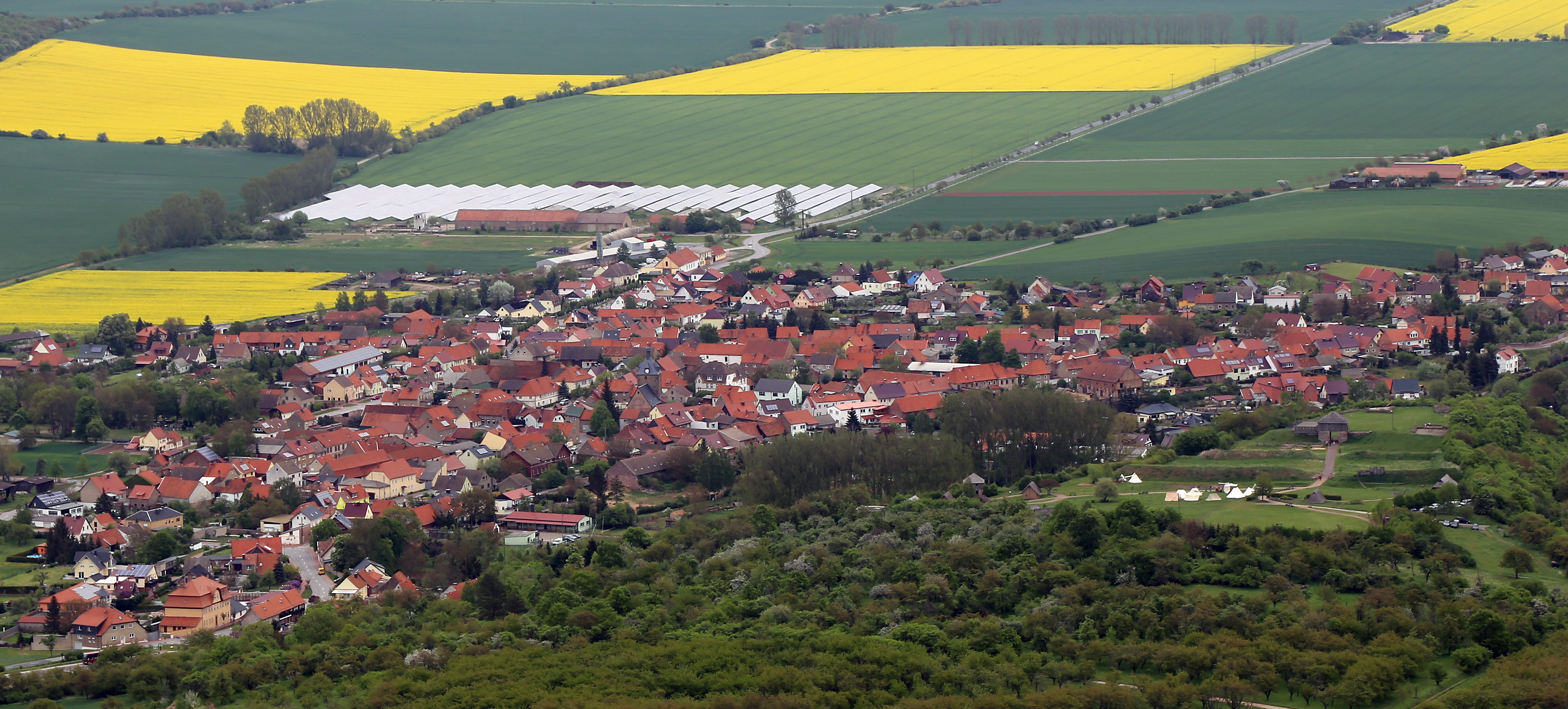 Blick auf Tilleda (Kyffhäuser) vom Kyffhäuserdenkmal